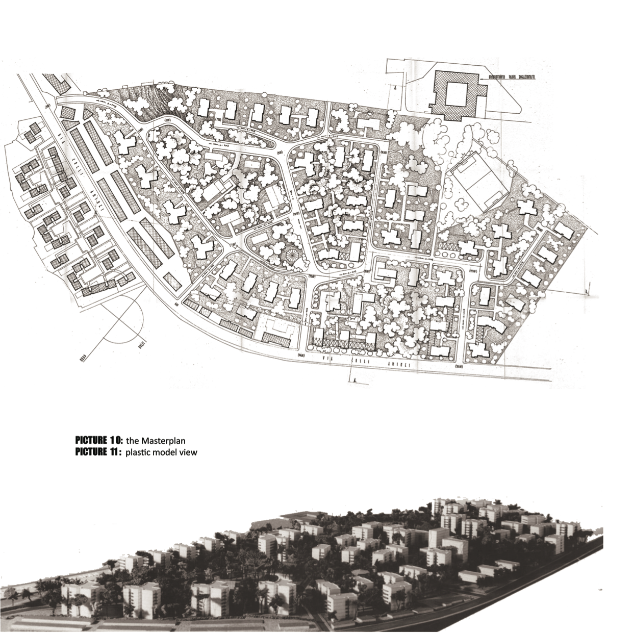 Progetto di lottizzazione dei Colli Aminei - Napoli , progetto di carlo migliardi, rappresentazione grafica adì Carlo Migliardi.